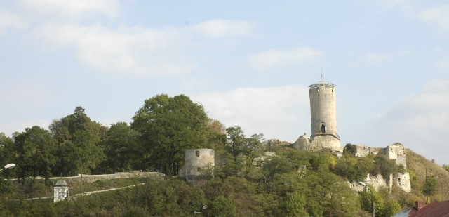 Poland, Ilza - castle.